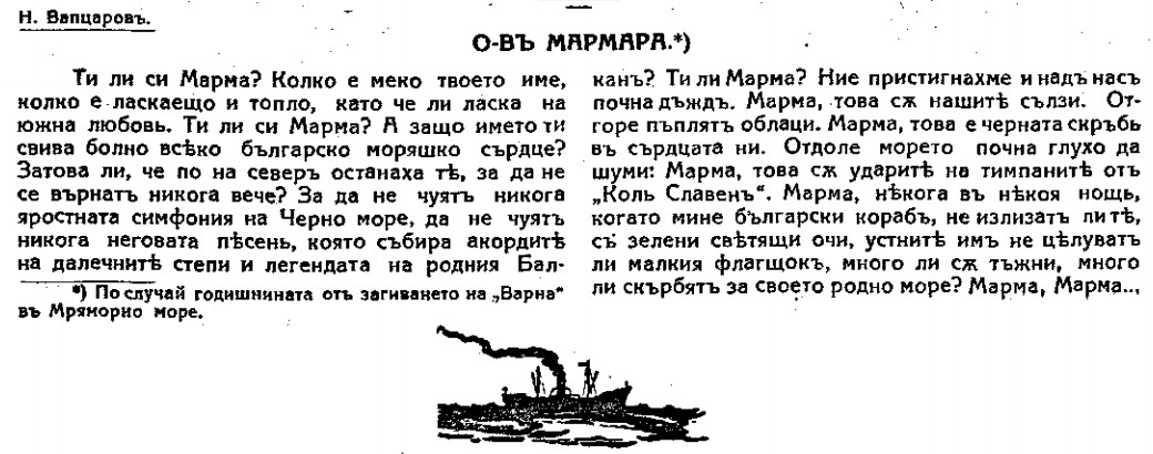 Докато е курсант в Морското училище младият Вапцаров пише пет "Импресии от параход "Бургас" . Една от тези импресии озаглавена "О-в Марма" и поместена в списание "Морски сговор", е писана по повод годишнината от гибелта на българския кораб "Варна" край бреговете на този остров.